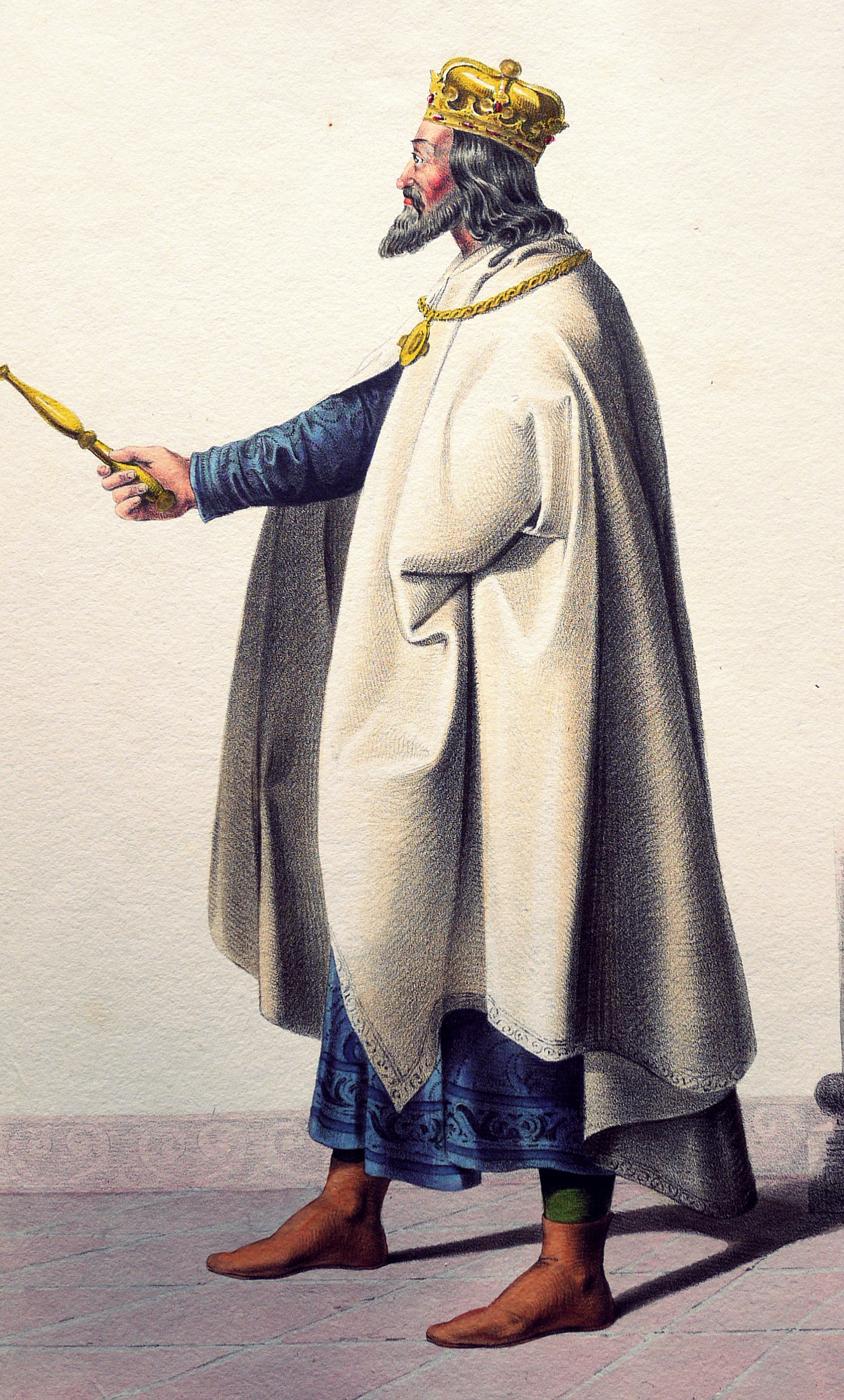 Andreas II. (1177-1235), König von Ungarn etc. Lithographie von Josef Kriehuber nach einer Zeichnung von Moritz von Schwind aus Ungerns Erste Heerführer Herzoge und Koenige In einer Reihe von Bildnissen von Bela bis auf Seine Majestät Franz I. Kaiser Von Österreich König Von Ungern &c., &c. Wien : Lithographisches Institut ;ca. 1828